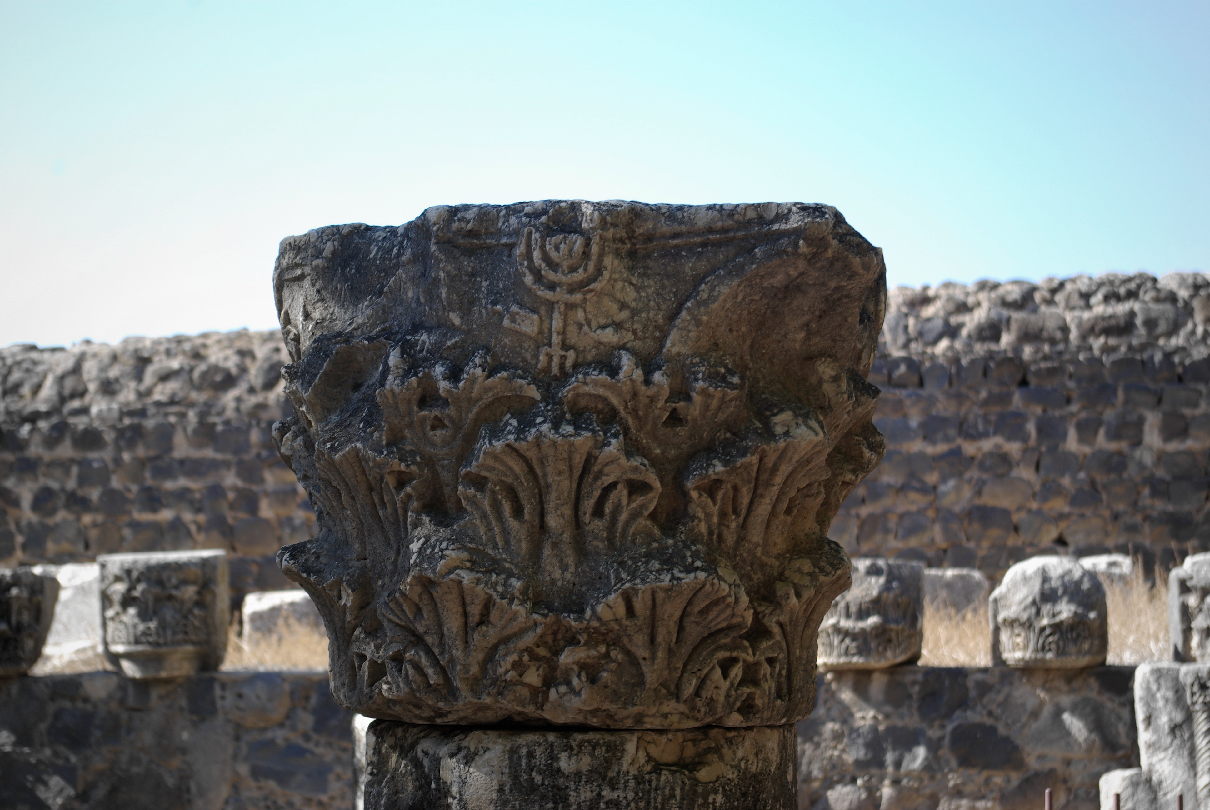 Kafarnaum